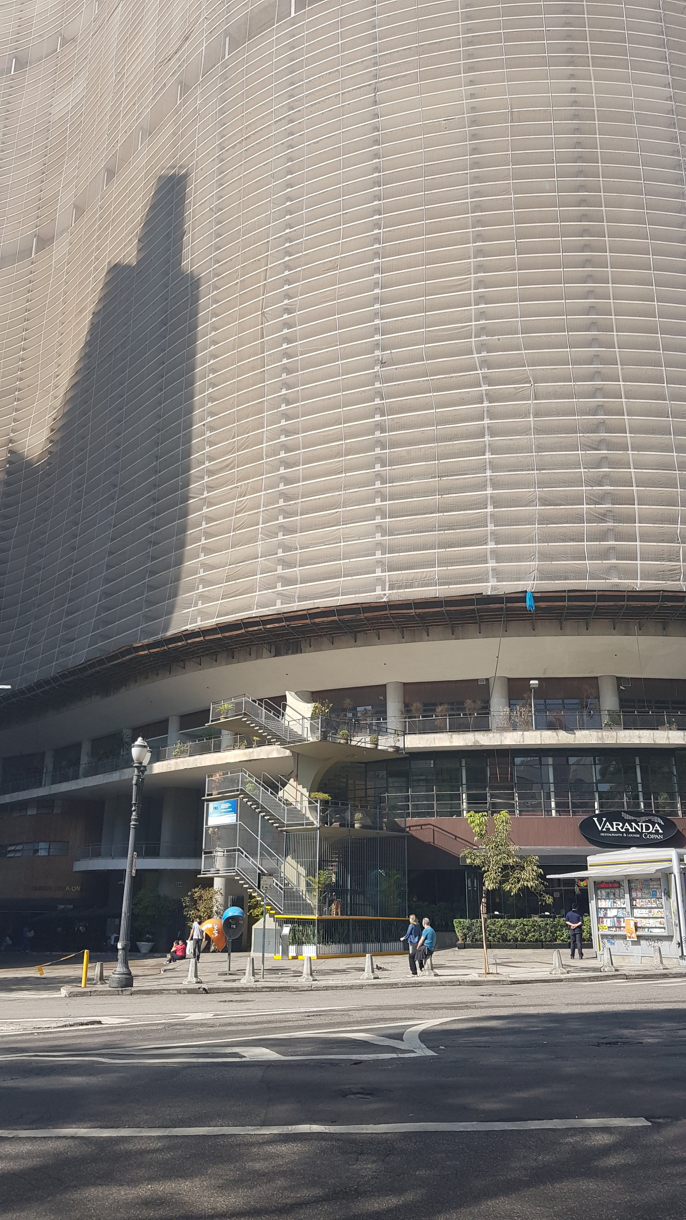 O Copan visto a parti do pedestre